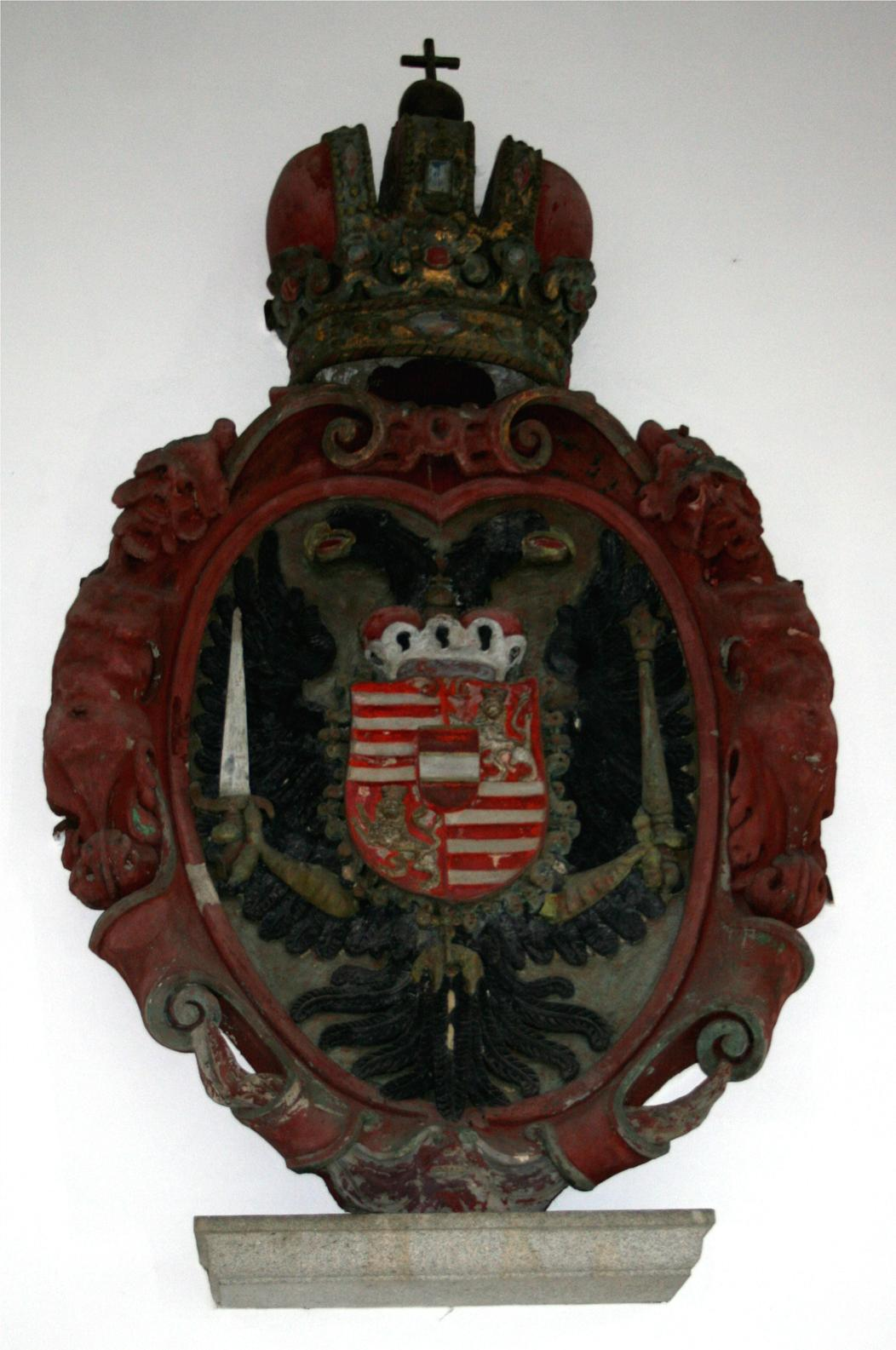 Wappen im Linzer Schloss in der Durchfahrt des ehemaligen Kapellentraktes. Zu sehen ist ein Doppeladler mit Schwert und Zepter, sowie aufgelegtem Wappen des Erzherzogtums Österreich (mit Bindenschild und Herzogshut). Über der Rollwerkskartusche die Kaiserkrone Rudolfs II.